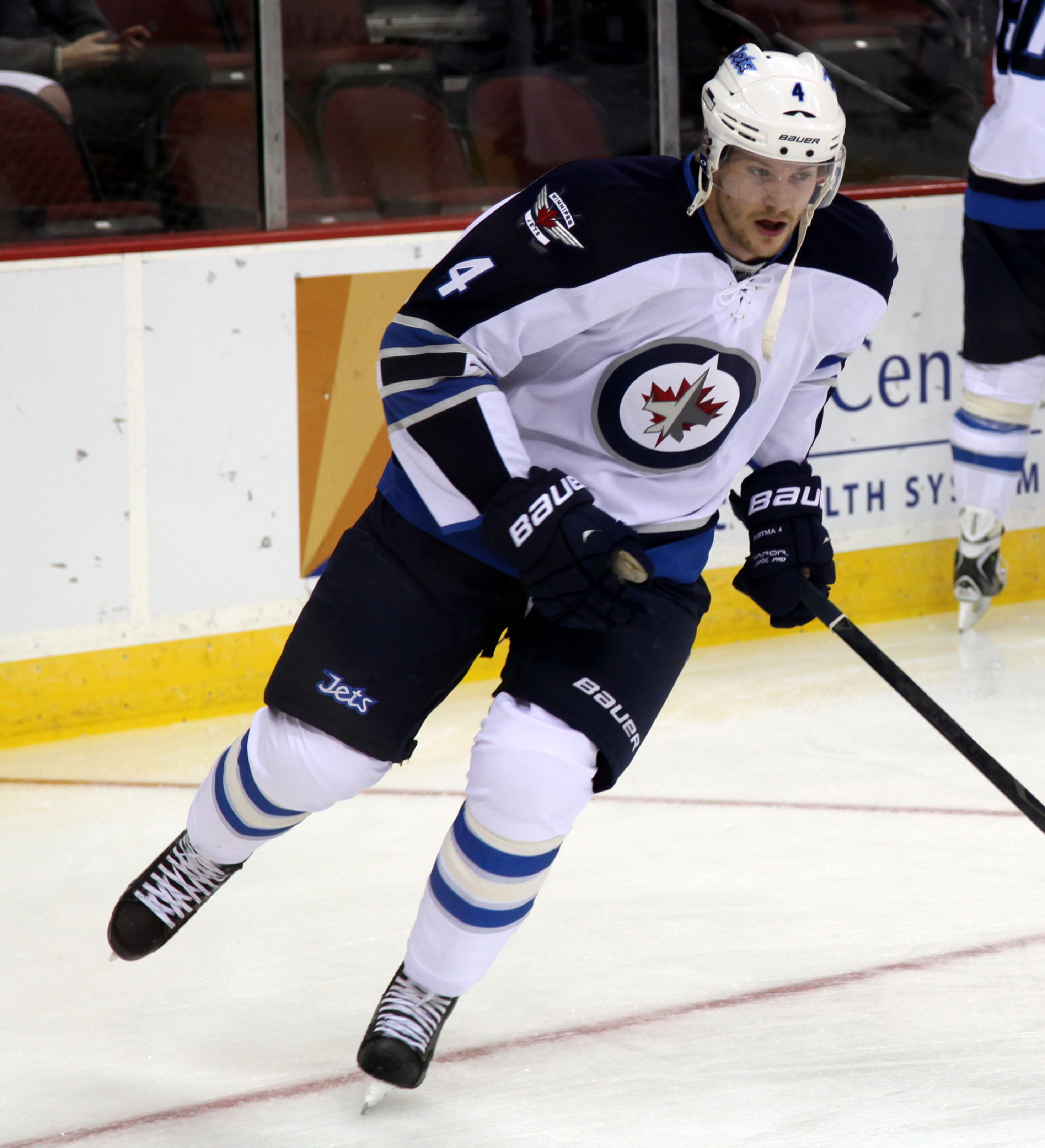 Postma in 2013.